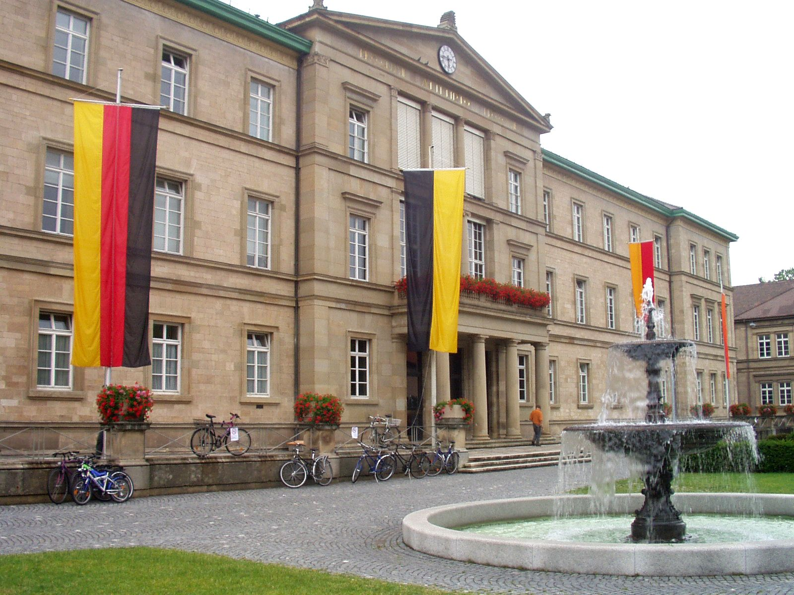 Die Neue Aula der Universität Tübingen (in der Wilhelmstraße). Foto von Otto Buchegger, Tübingen, 2003. Lizenz GNU FDL